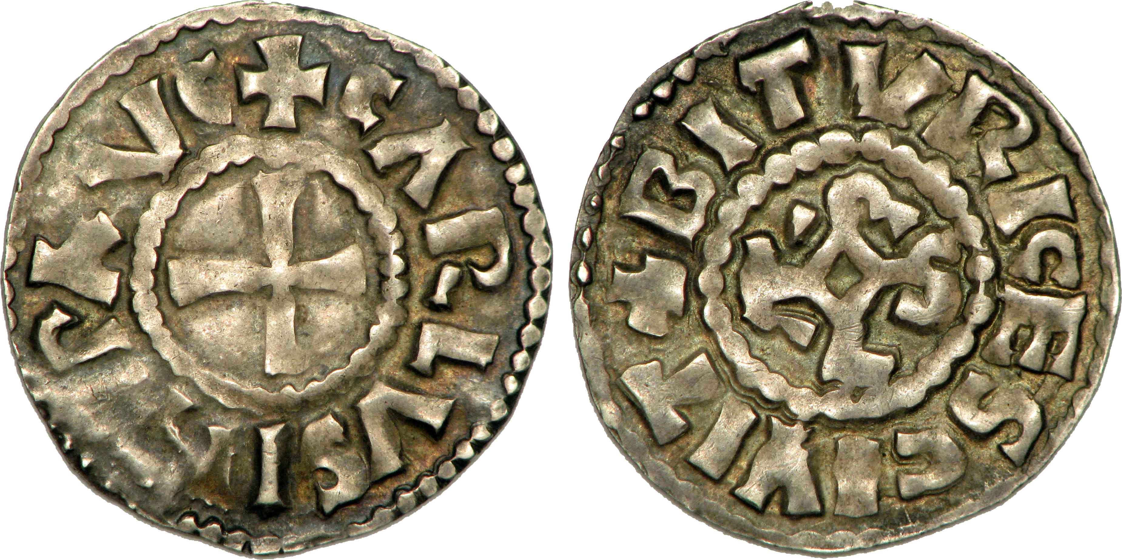 Nom de l'atelier/ville : Bourges Métal : argent Diamètre : 20,5mm Axe des coins : 6h. Poids : 1,67g. Titulature avers : + CARLVS INP AVC. Description avers : Croix. Traduction avers : (Charles, empereur auguste). Titulature revers : + BITVRICES CIVIT, (légende commençant à 9 heures). Description revers : Monogramme carolin (KAROLVS). Traduction revers : (Cité de Bourges).